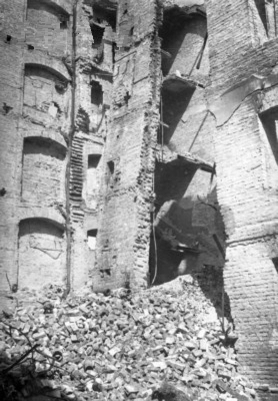 Ruiny kamienicy przy ul. Franciszkańskiej 12.